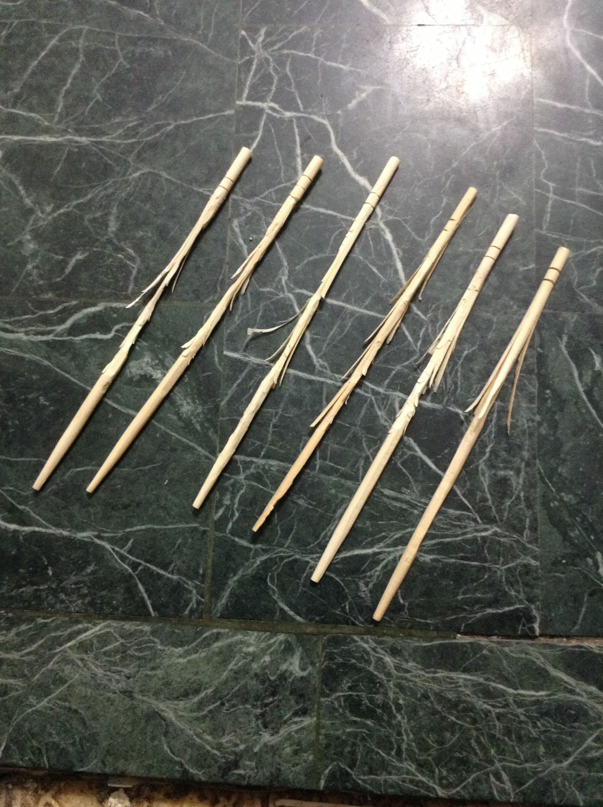 火煤棒成品。